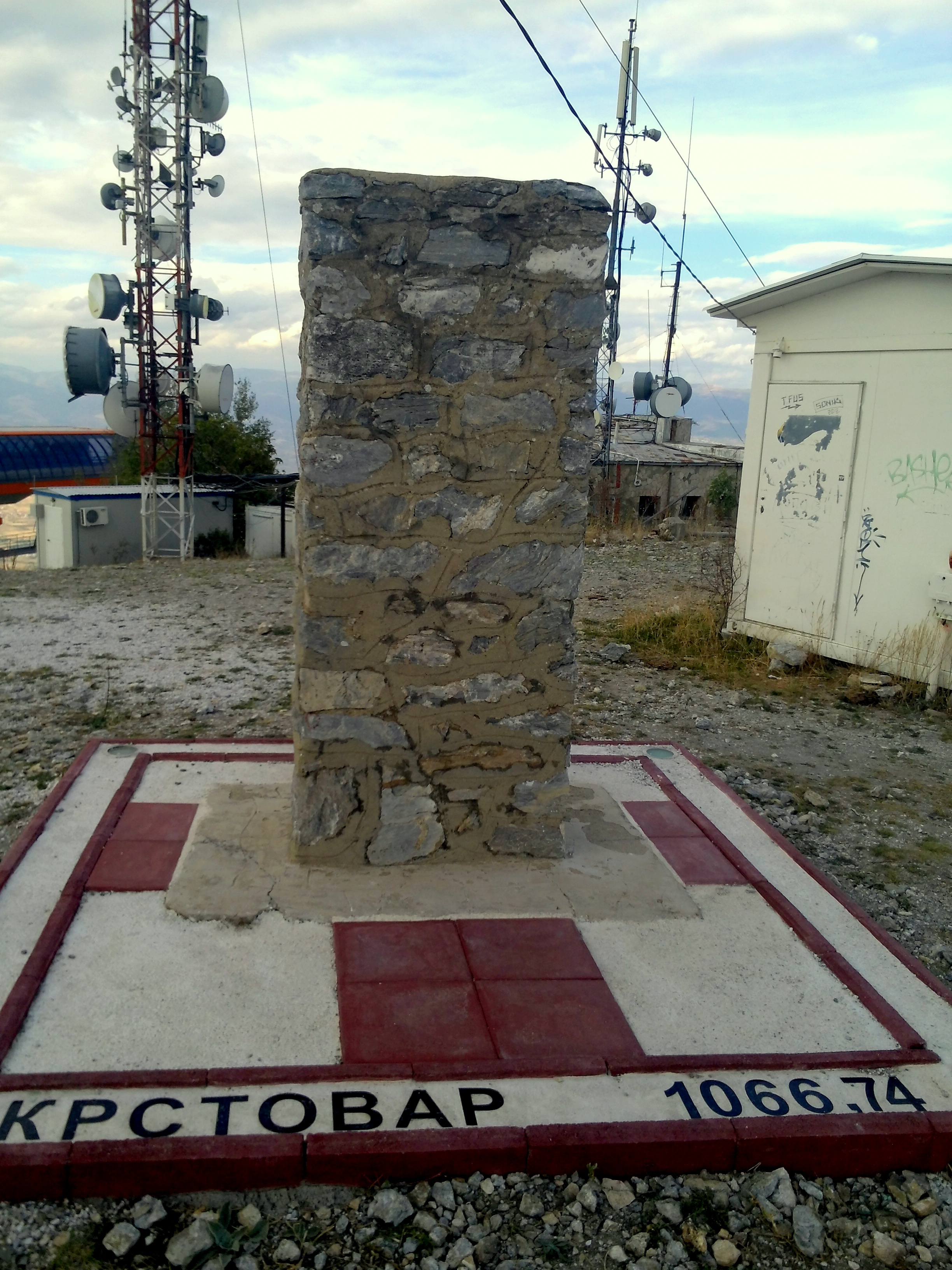 Бележник на врвот Крстовар (1.066 м) на планината Водно.